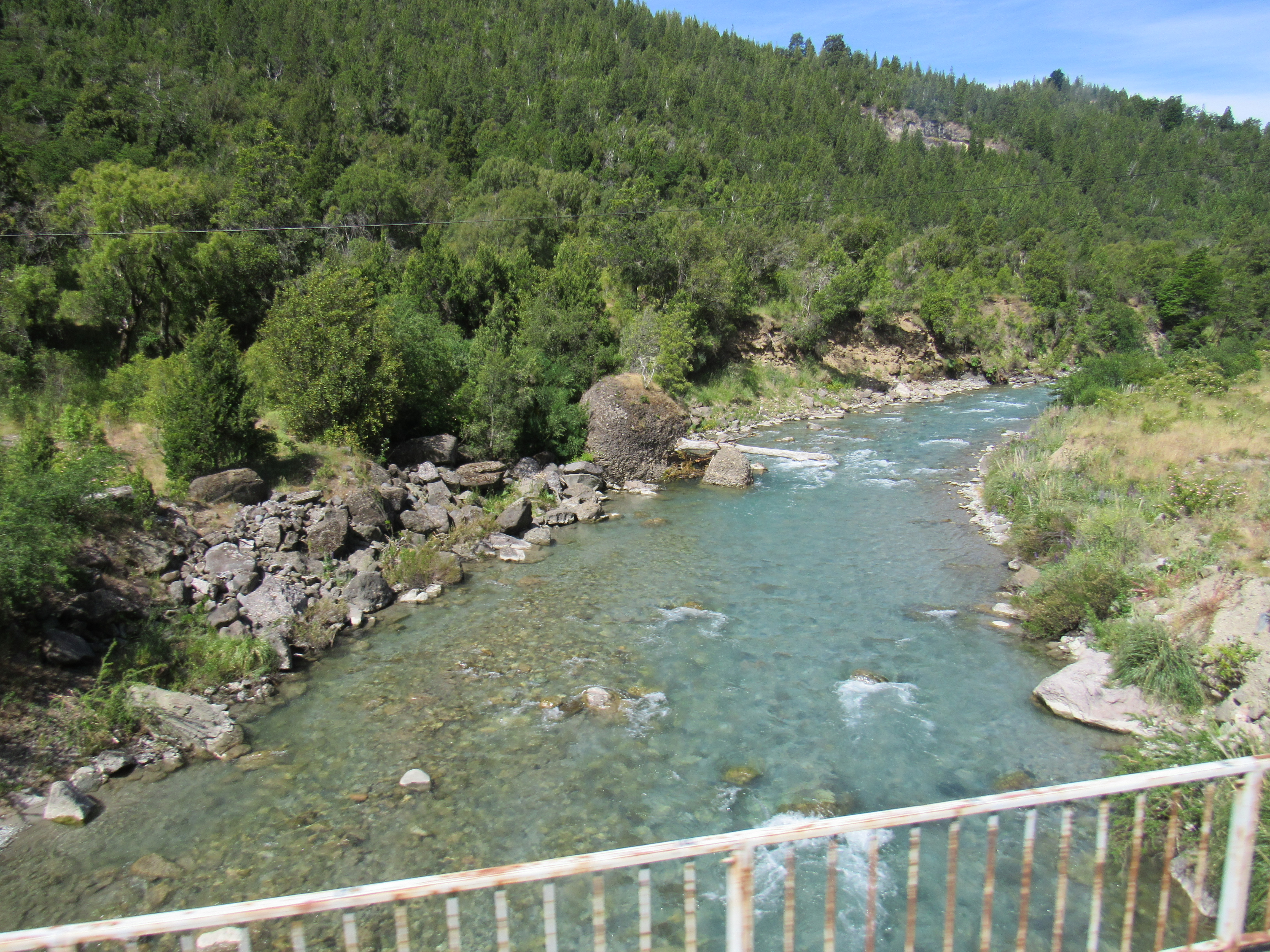 Puente del Río Villegas a la vera de la ruta 40